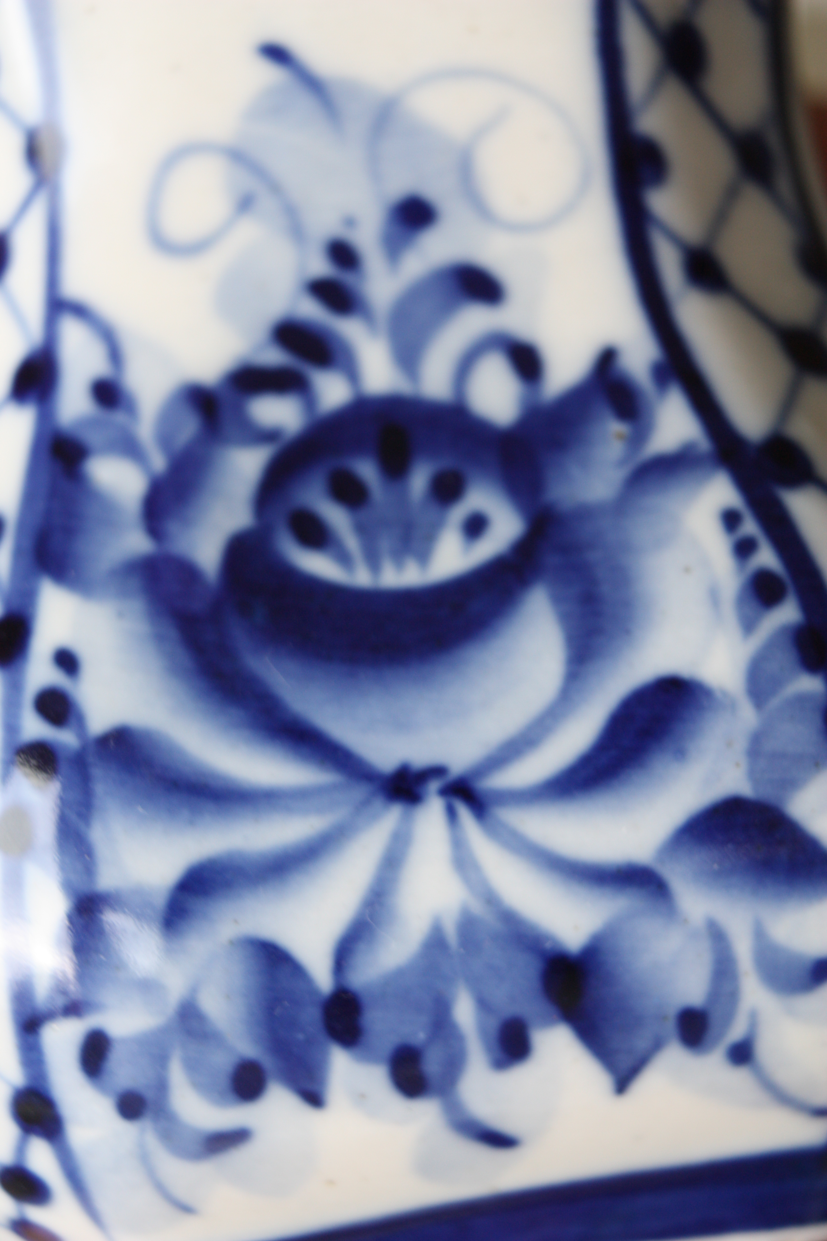 Gschel, Keramik, Russland